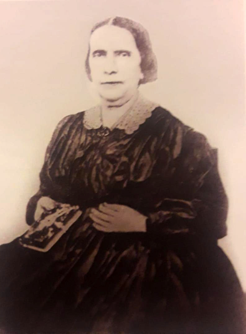 Buenaventura Saravia Arias, esposa del gobernador santiagueño Juan Felipe Ibarra (circa 1838).